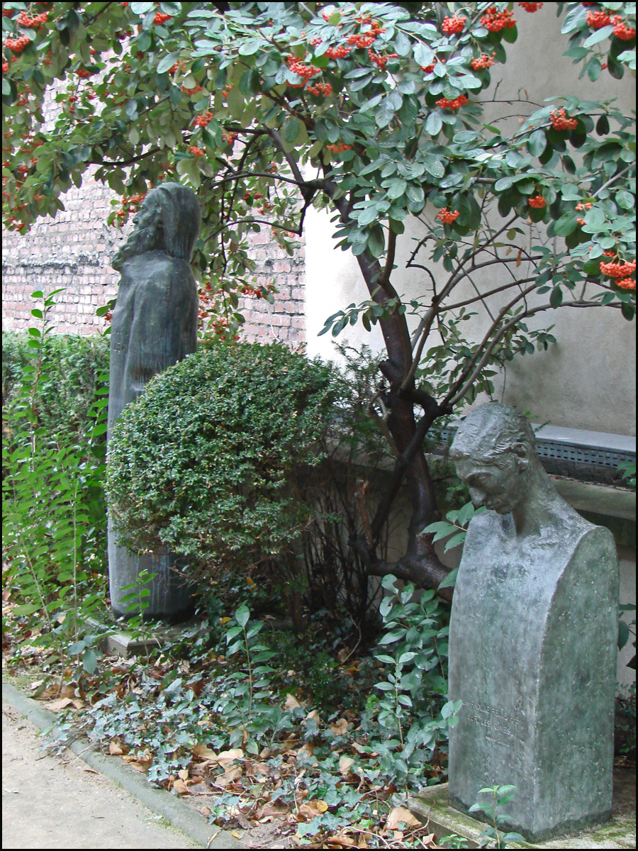 Au premier plan, buste-stèle de Mécislas Golberg 1898-1899 bronze, fonte Susse n°1 A l'arrière buste-stèle d'Onésime Reclus 1919 Portrait du géographe O. Reclus (1837-1916) Bronze, fonte Godard n°2 Oeuvres d'Antoine Bourdelle (1861-1929) legs Rhodia Dufet-Bourdelle à la ville de Paris 2002 dans le Jardin du musée Bourdelle